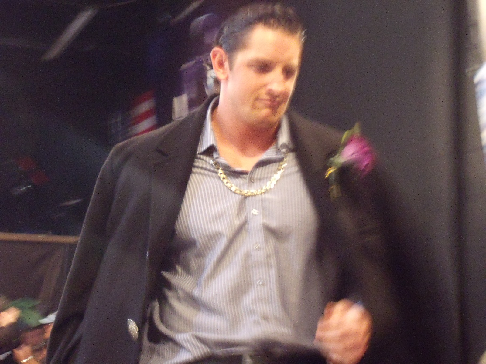 NXT's Newest Superstar Wade Barrett. 1/21/10.